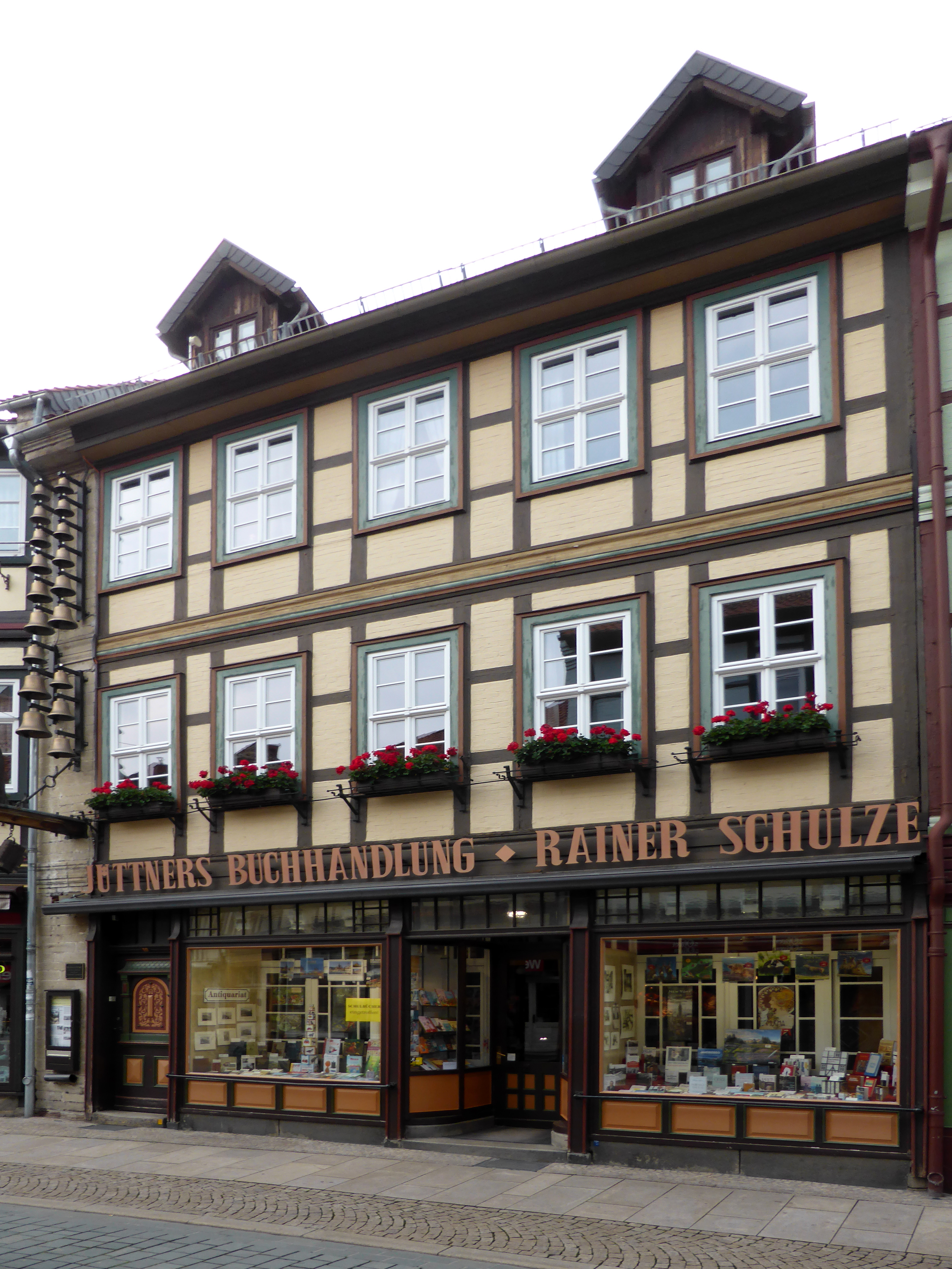 Jüttners Buchhandlung, Westernstraße, Wernigerode, Bruno Jüttners Geburtshaus.